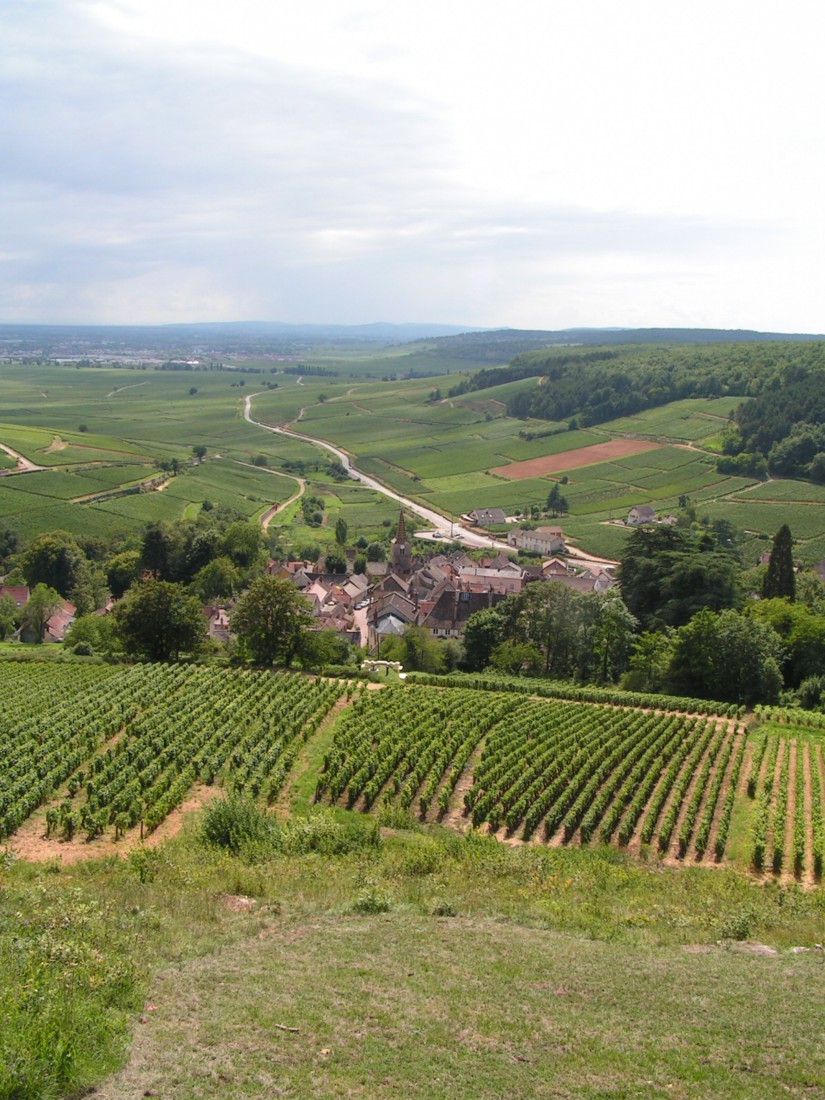 Pernand-Vergelesses, village vinicole de la Côte de Beaune (région de la Côte d'Or en Bourgogne - France)